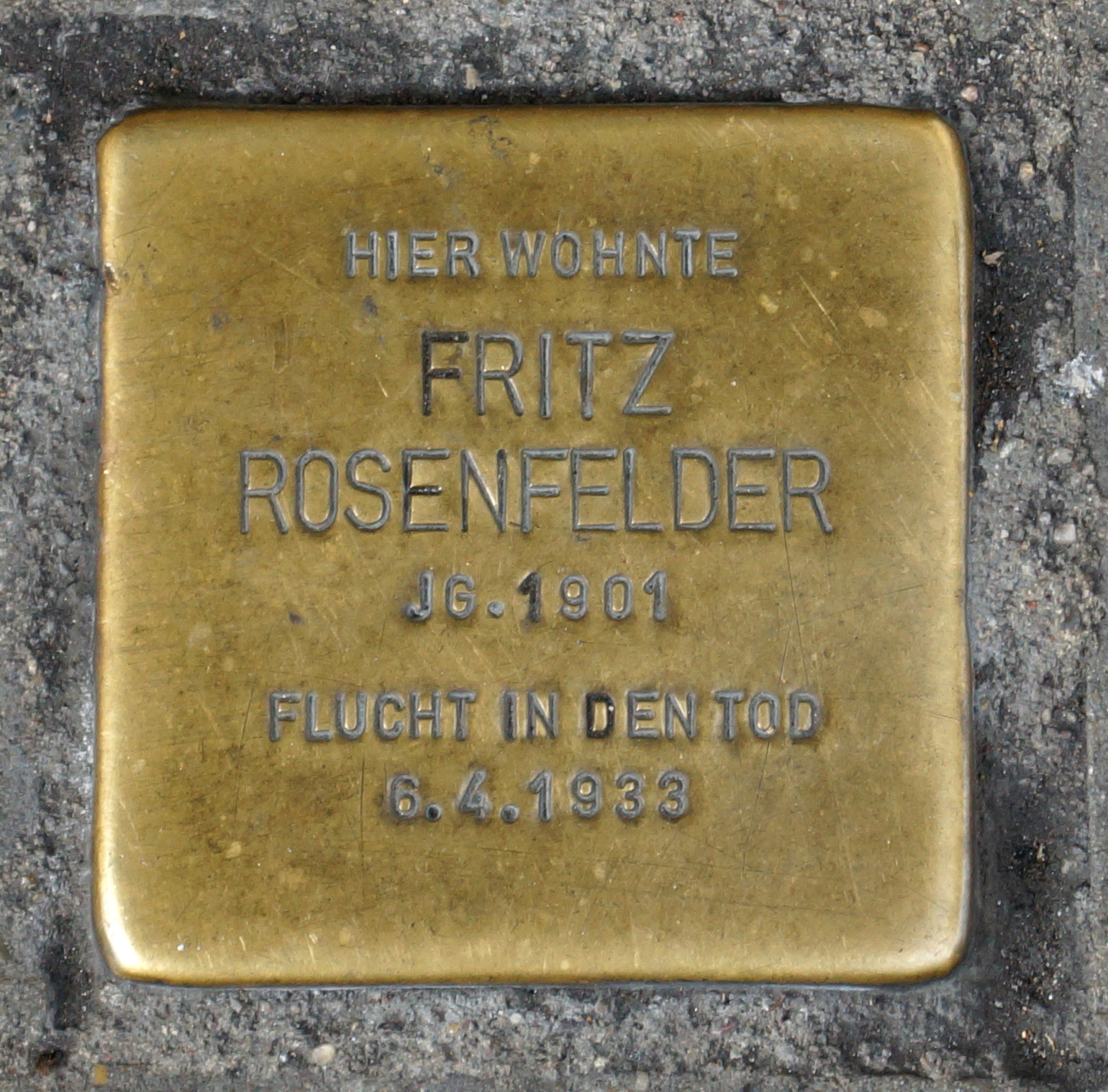 Stolperstein für Fritz Rosenfelder. "Hier wohnte / Fritz / Rosenfelder / JG. 1901 / Flucht in den Tod / 6.4.1933"